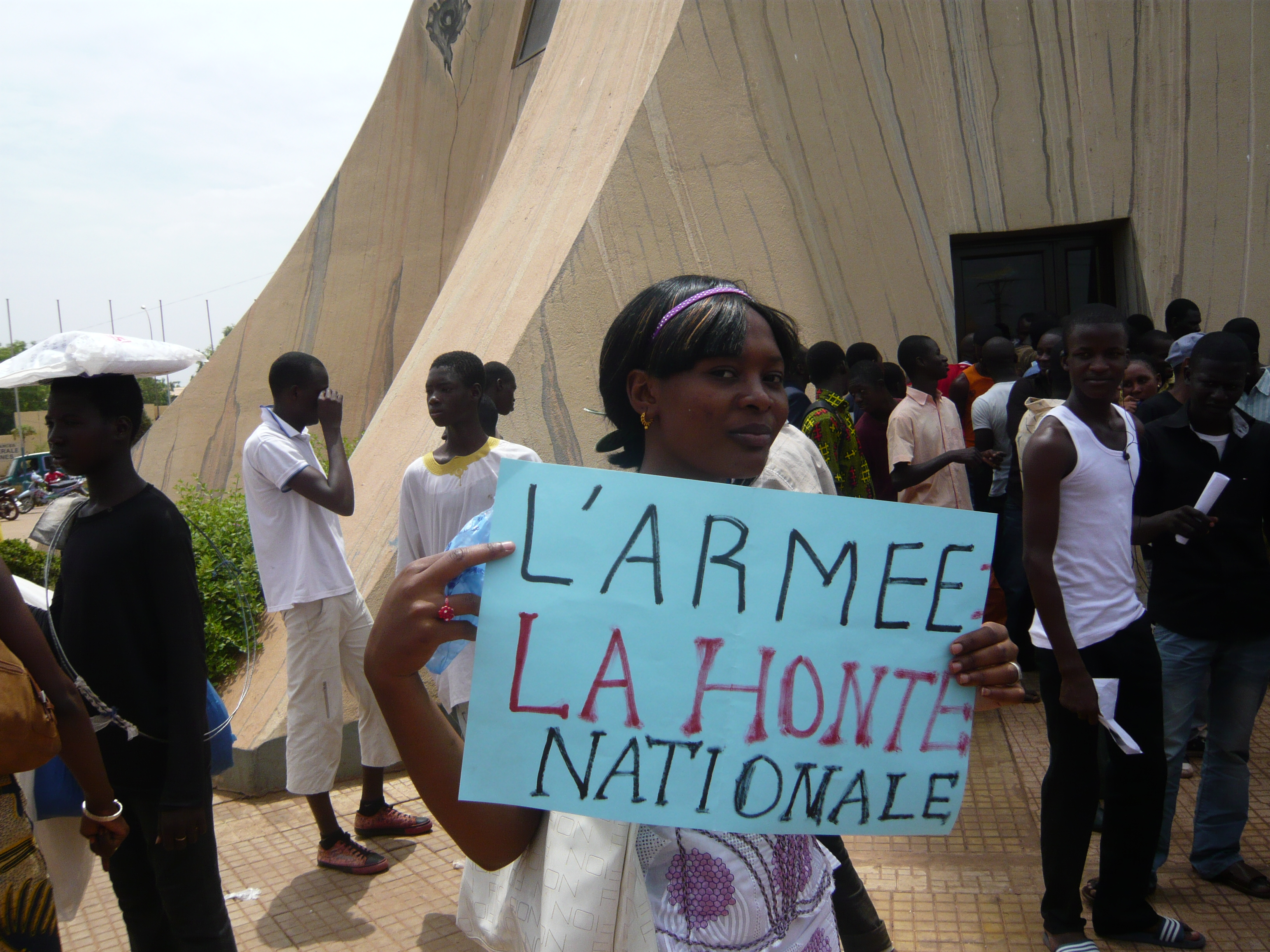 Marche pour le Nord Mali